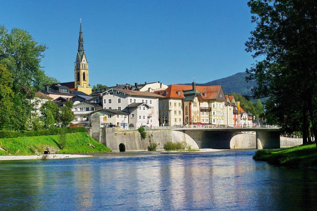 Bad Tölz, Blick von der Isar zur Altstadt